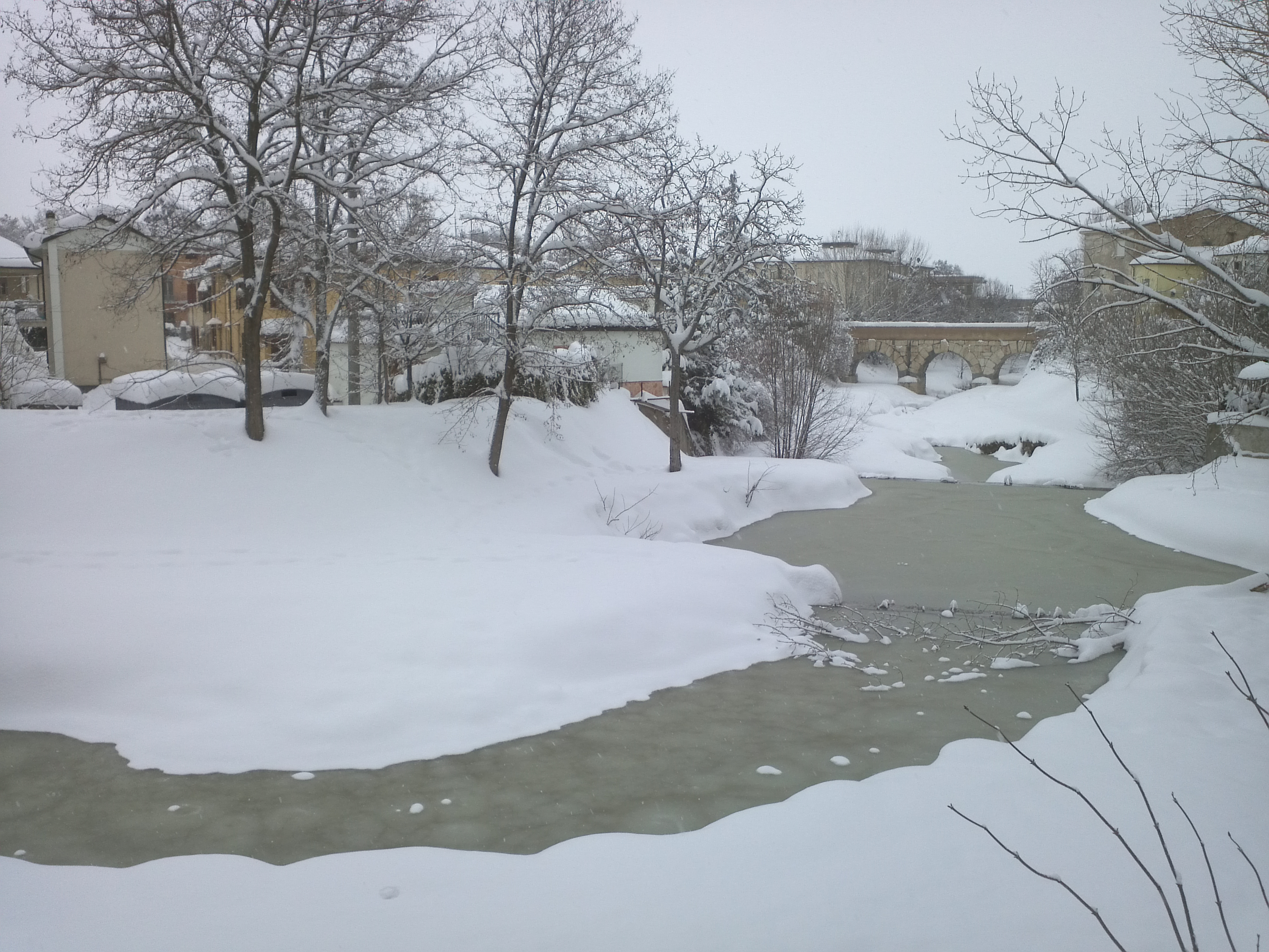 Il ponte consolare romano di Savignano sul Rubicone innevato nel febbraio 2012.